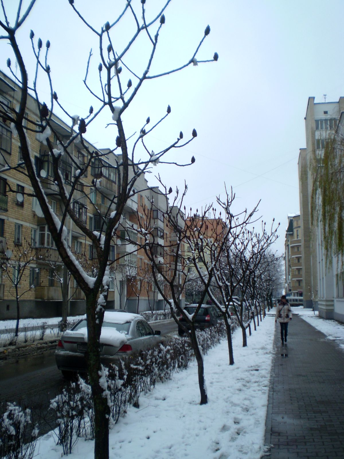 Вул. Маякоўскага